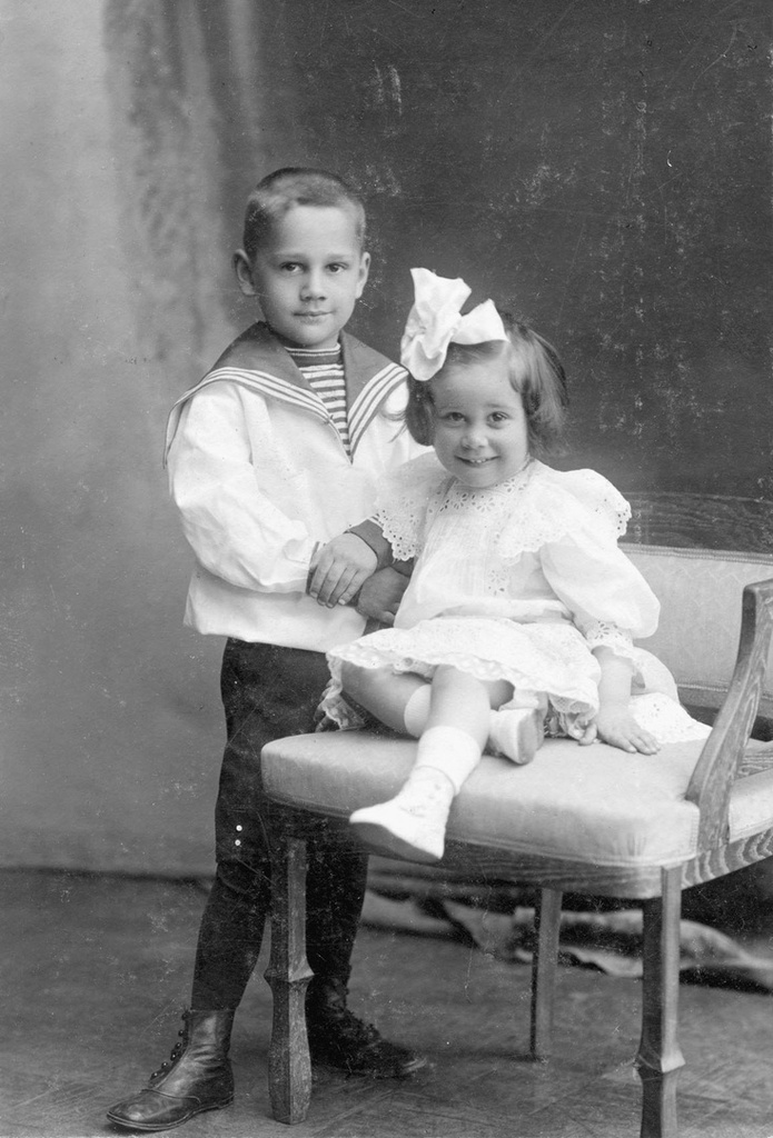 Смирнов-Русецкий Борис Алексеевич (будущий художник) и его сестра Таня. 1910г.